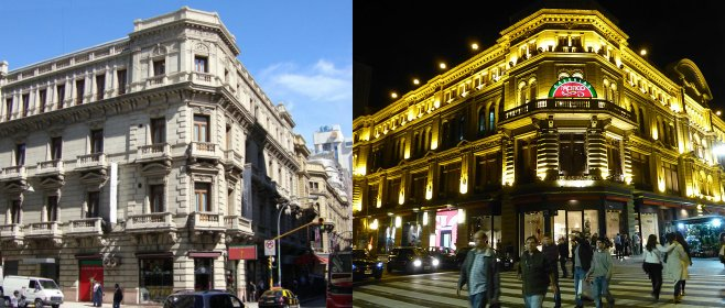 Galerías Pacífico. Buenos Aires. A la izquierda el Hotel Esplendor a la derecha las Galerías Pacífico.